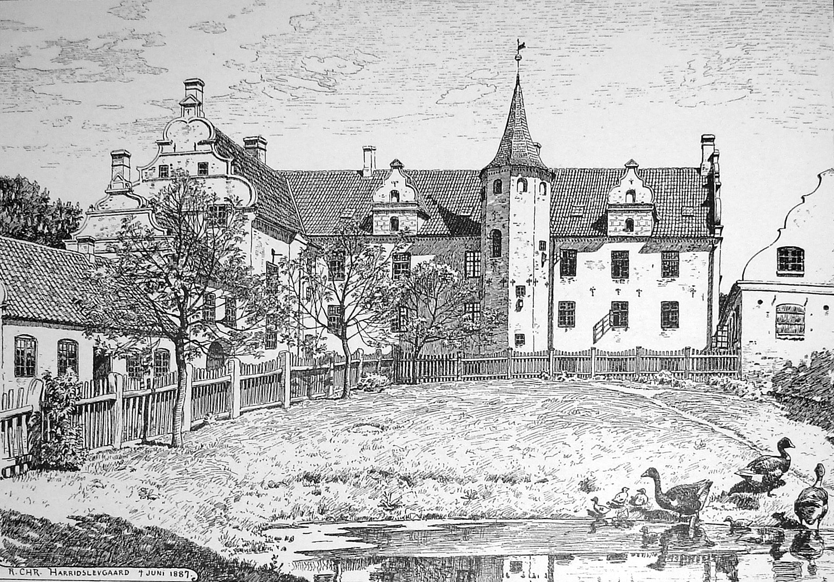 Harritslevgård